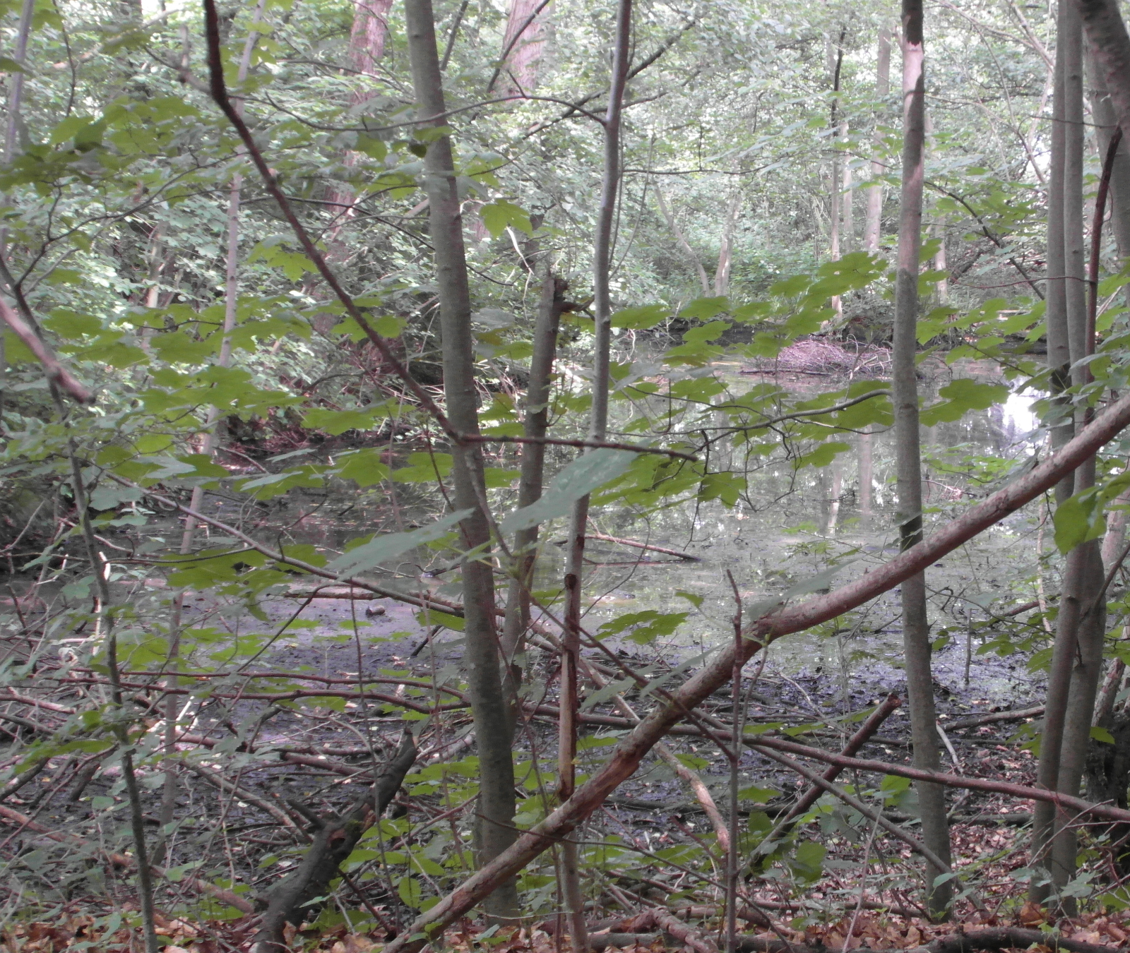 Feuchtbiotop Freibad Bredenbeck. Naturdenkmal (ND-H 51) in Wennigsen (Deister), Region Hannover, Niedersachsen